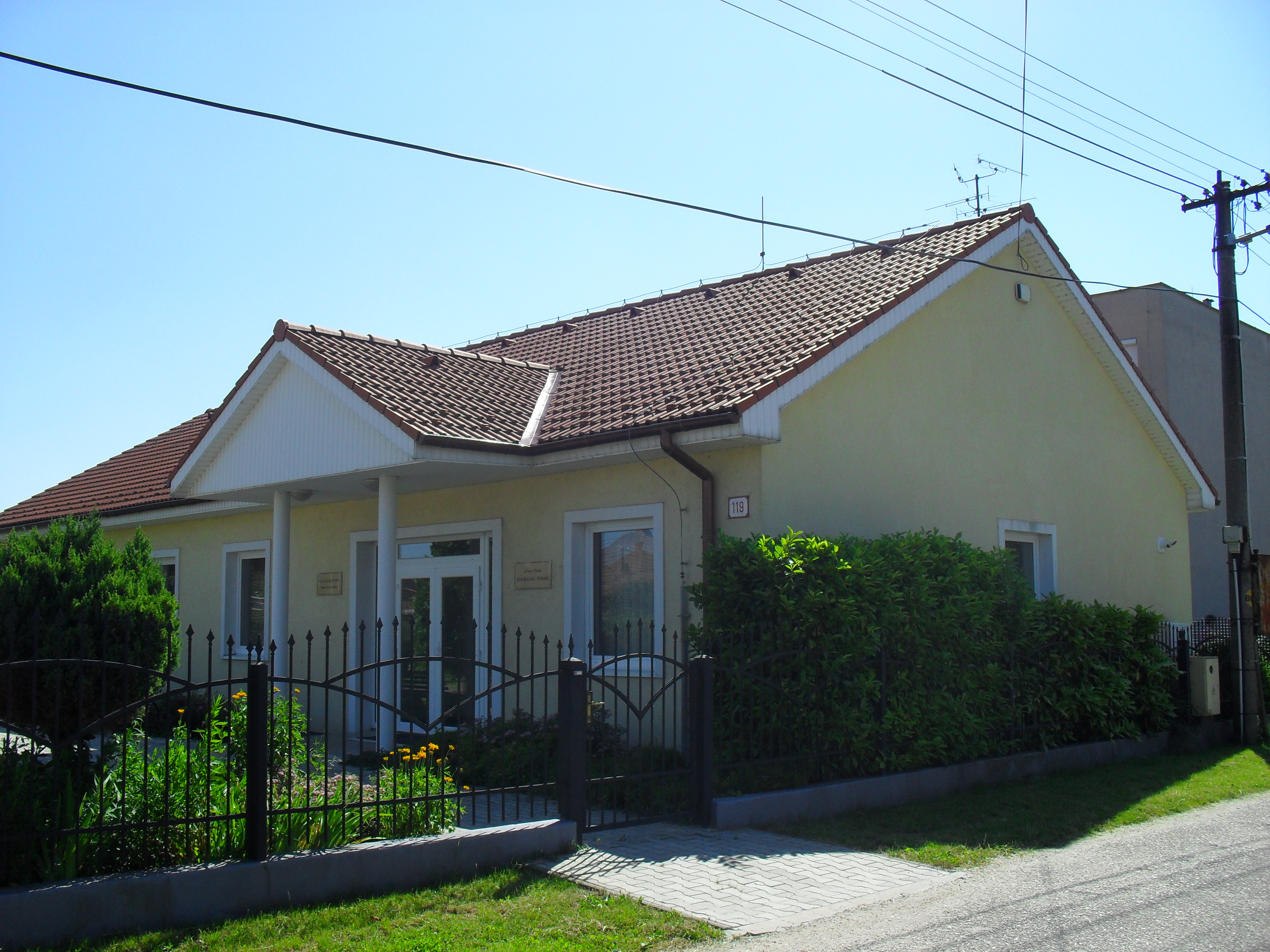 Ógyalla - Jehova Tanúi Királyság Terme (Kis utca)